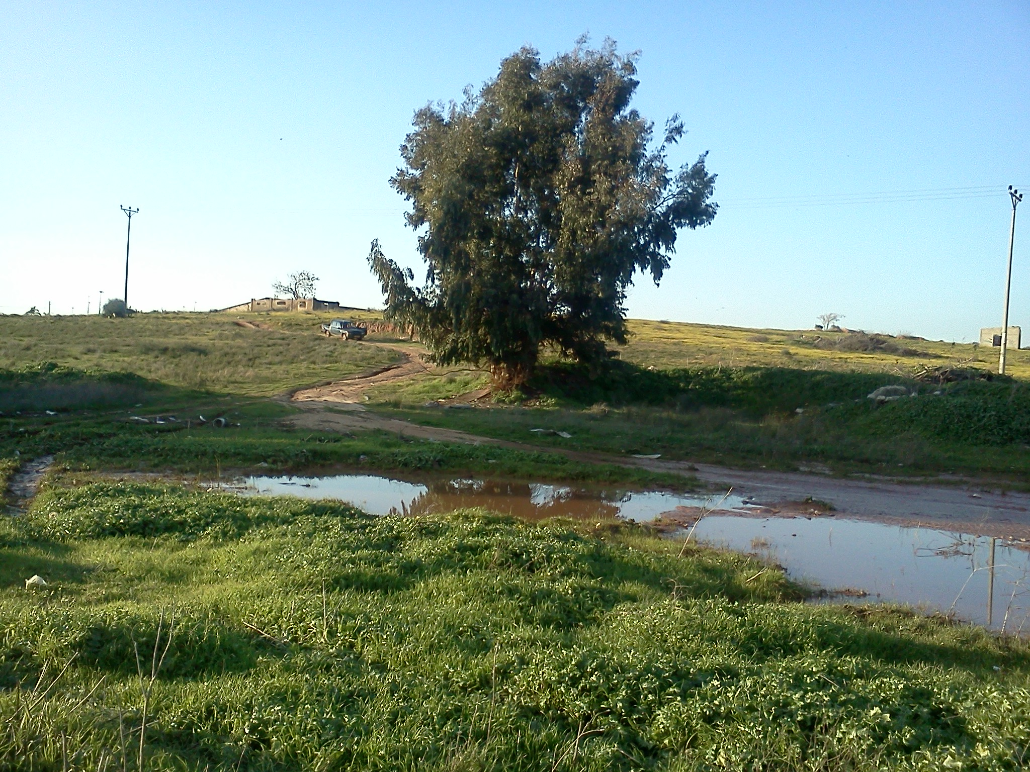 שלוליות בוואדי למון